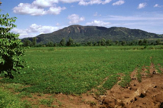 Rota stratovolcano in Nicaragua.